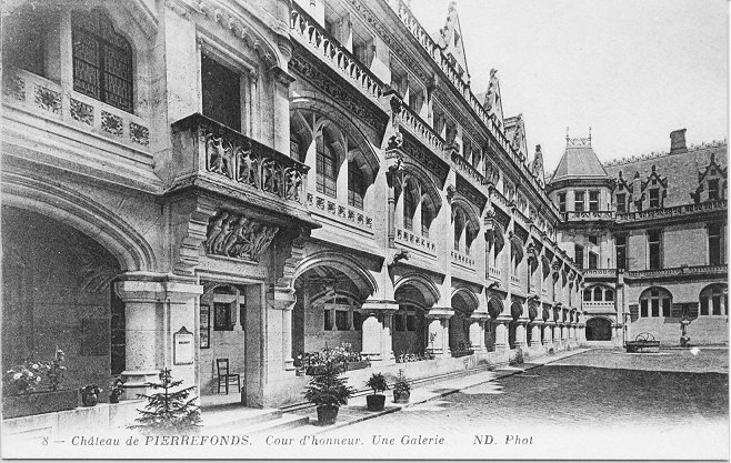 Pierrefonds : Cour d'honneur du château